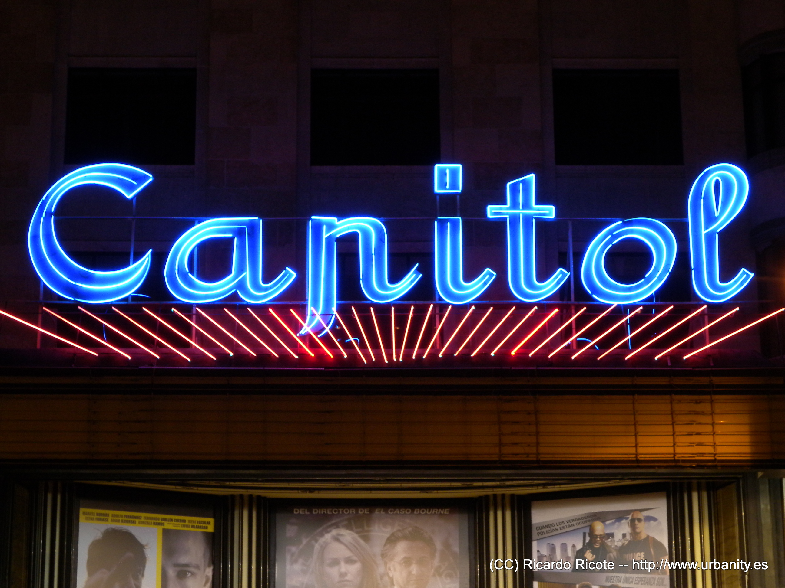 Cine Capitol